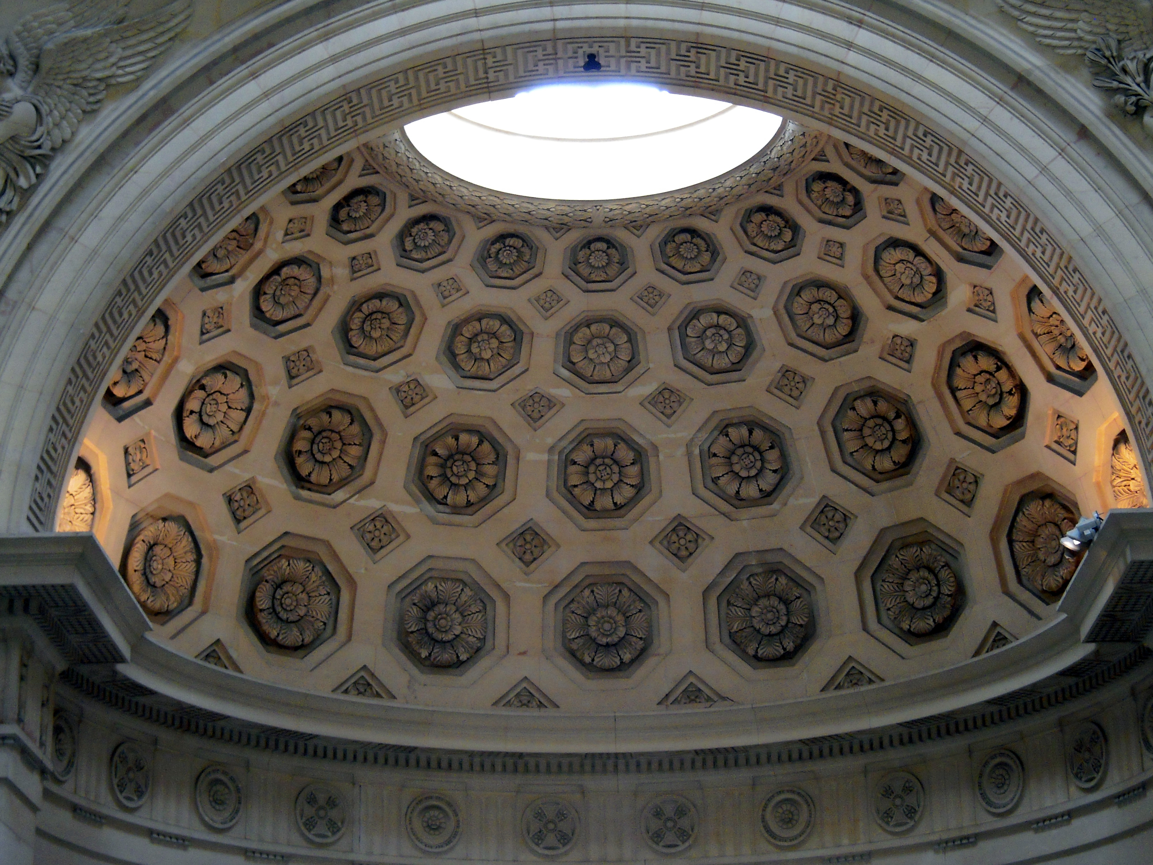 Chapelle expiatoire - Voute avec son ouverture zénithale